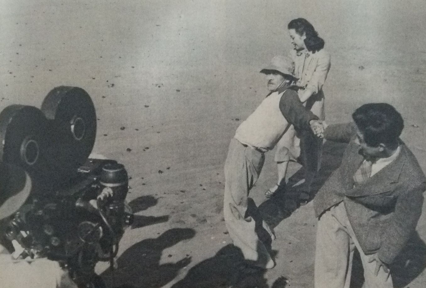 映画『麗春花』の撮影風景（中央は島耕二）